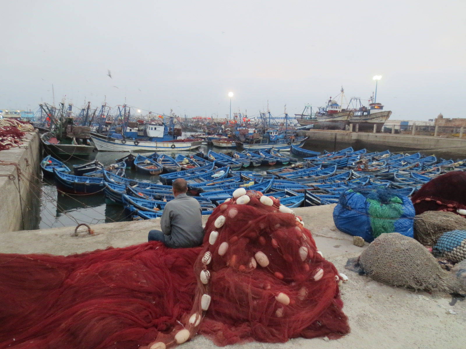 Essaouira Port and Ships